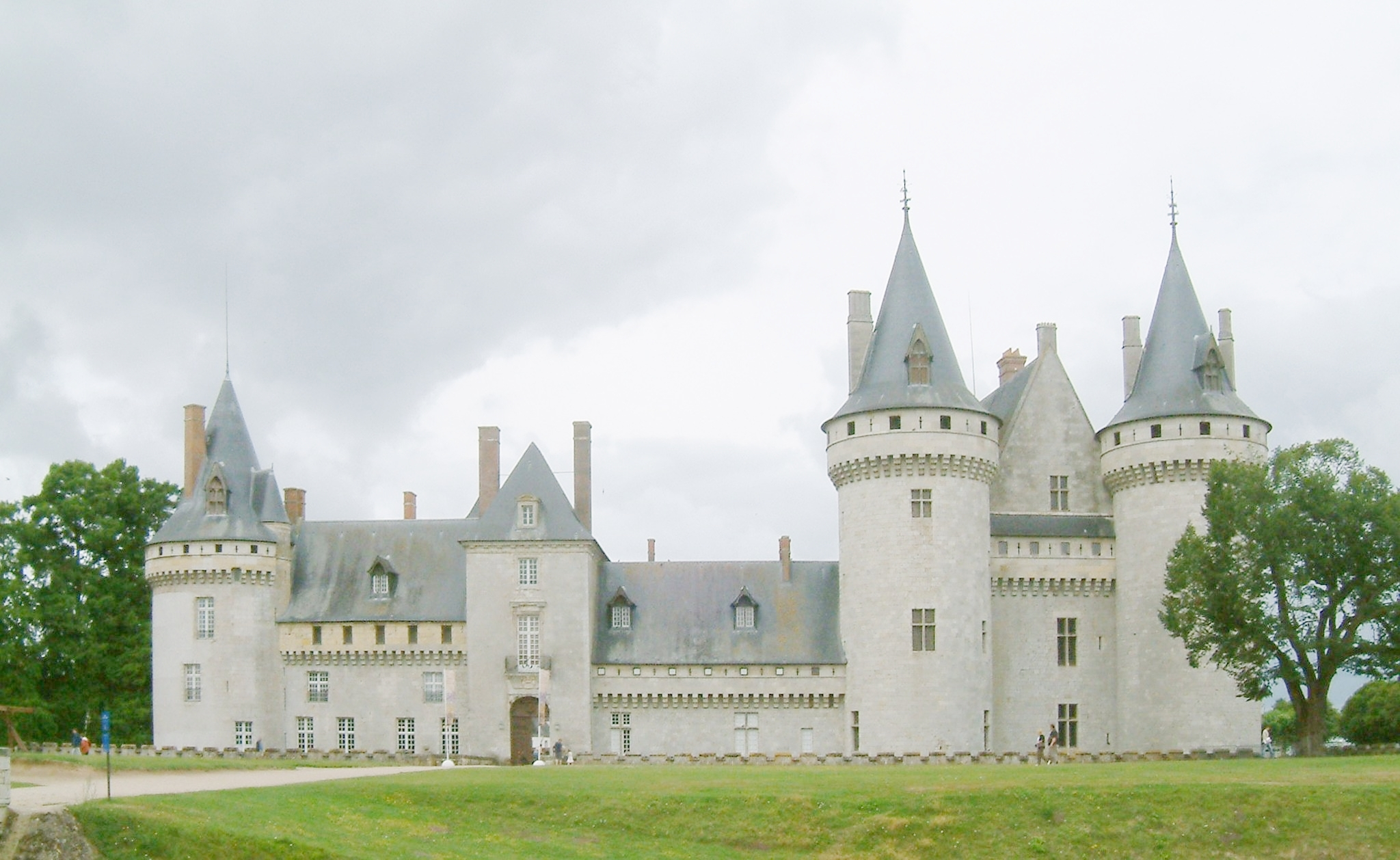 Château de Sully-sur-Loire vu du parc du château